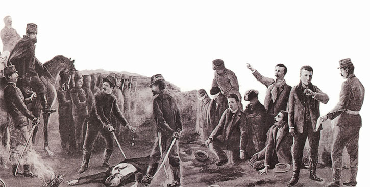 Grabado de la Masacre de Lo Cañas, ocurrido el 18 de agosto de 1891, durante la Guerra Civil chilena de 1891.